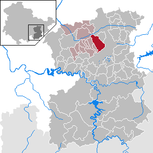 Weira in Thuringia - Saale-Orla-Kreis